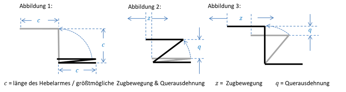 die Darstellung zeigt das Funktionsprinzip der auxetischen Hebelmechanik